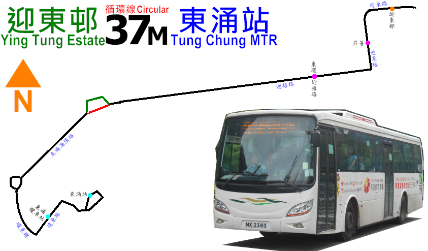 中文（香港）: 新大嶼山巴士37M線的走線圖